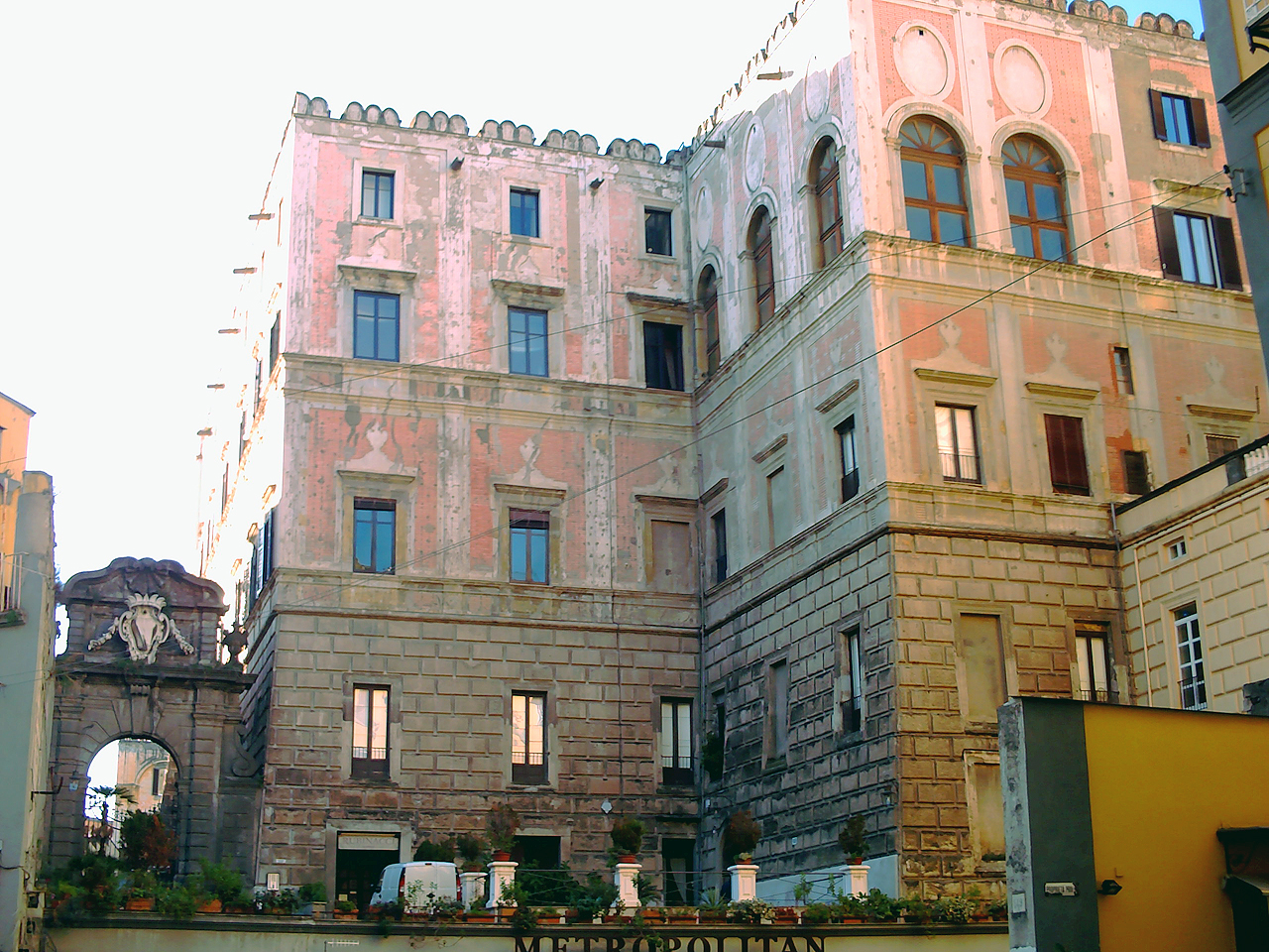 Palazzo Cellammare, Napoli